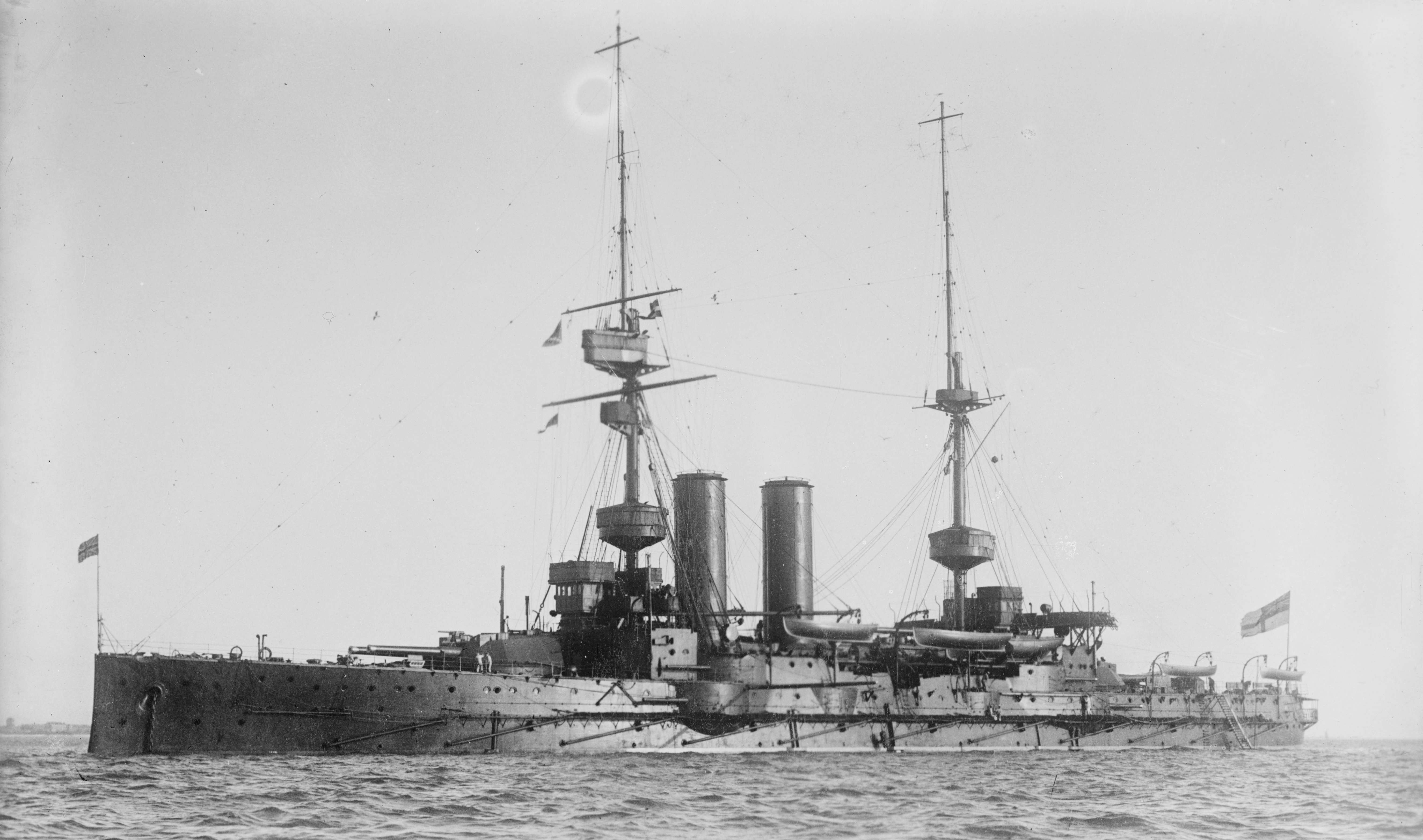 HMS Albemarle